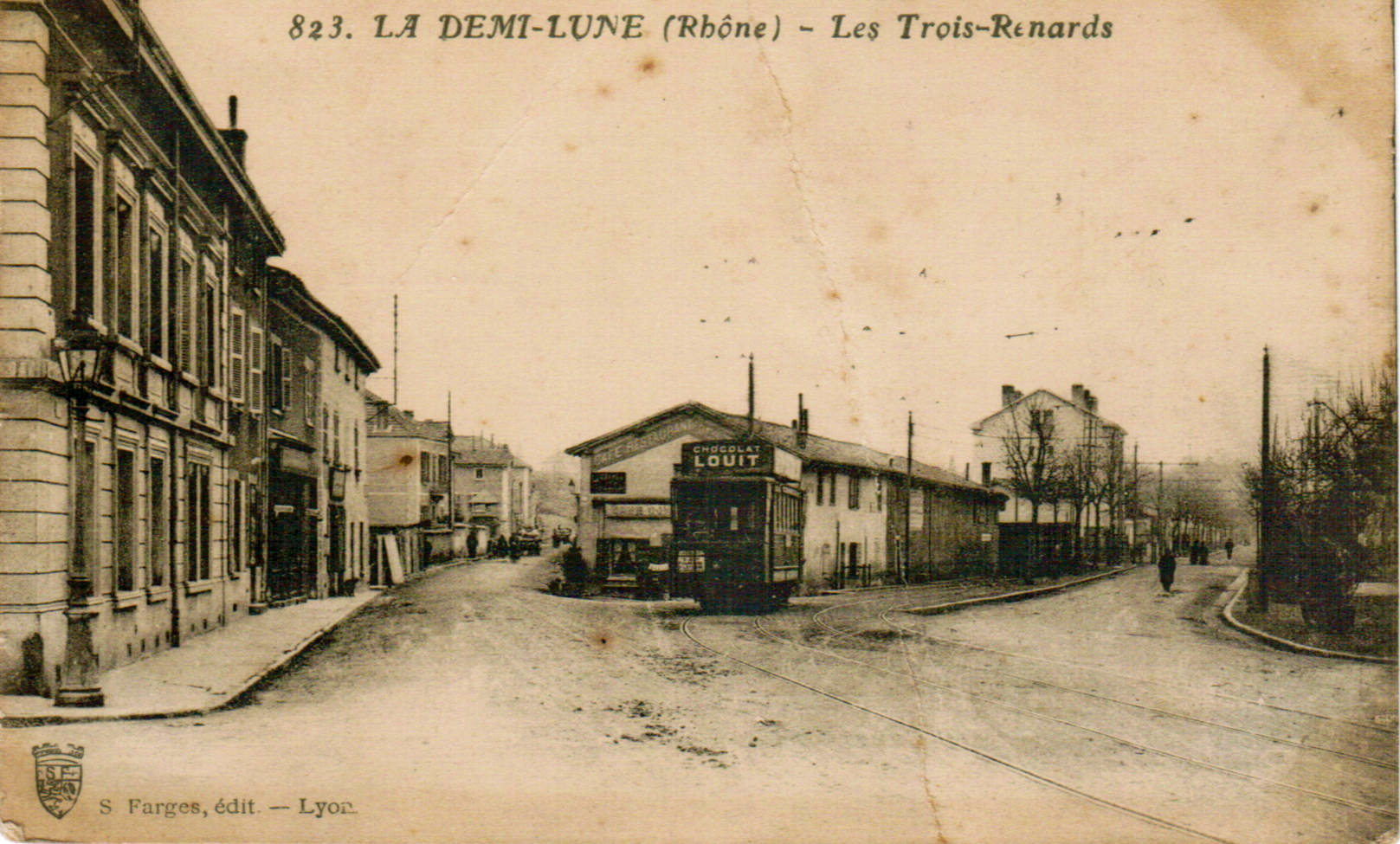 Carte postale éditée par Farges, éditeur à Lyon, n°823LA DEMI-LUNE (Rhône) : Les Trois-Renards